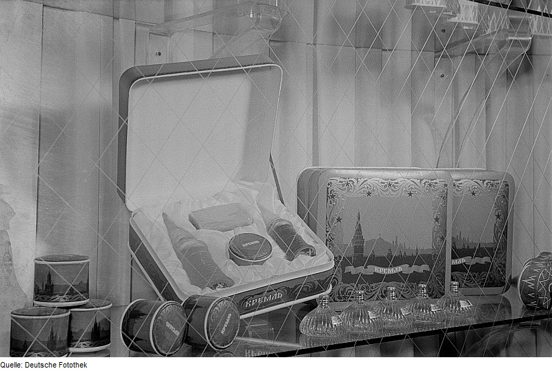 Original image description from the Deutsche FotothekKosmetikartikel "Kreml" auf der Leipziger Herbstmesse 1954